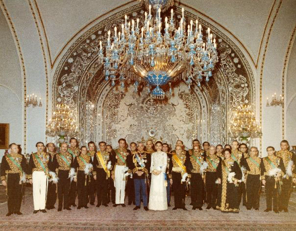 Le cabinet du Premier Ministre Hoveida à l'occasion de l'inauguration du 23e Majlis